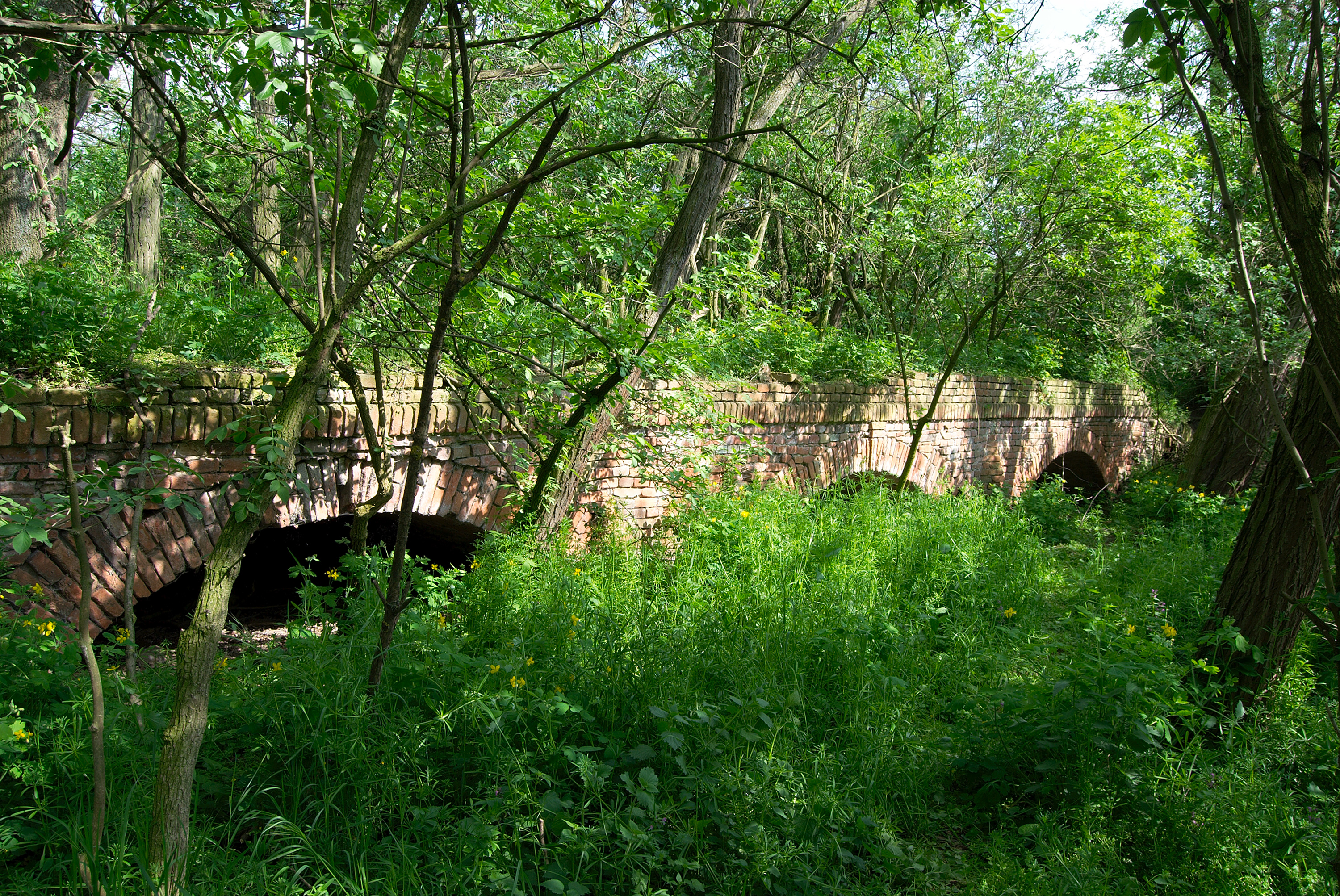 Západní část cihlového mostu k Tichému ostrovu u Mikulova (vyfotografováno od jihu. Jedná se o památku ze 17. století.)